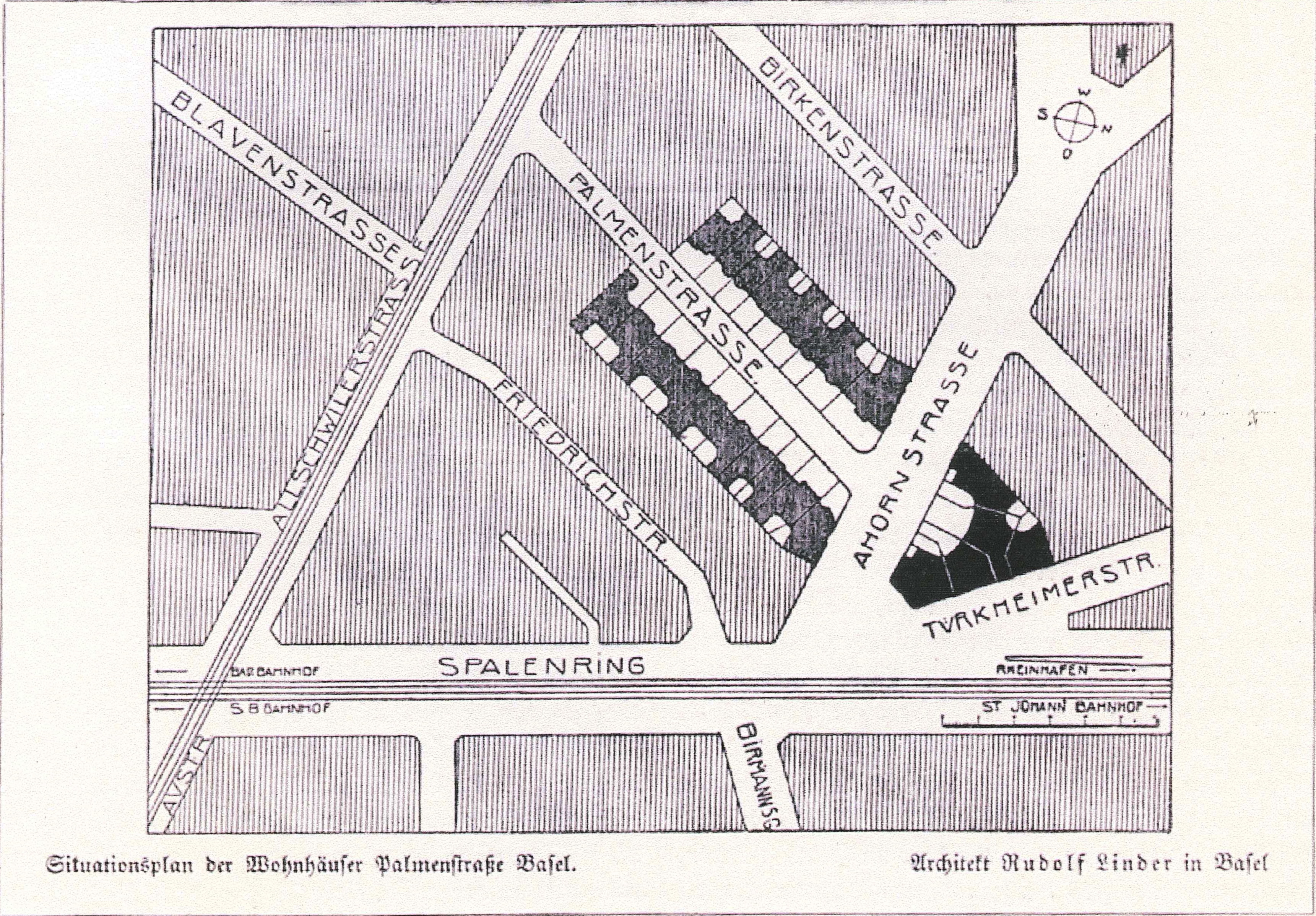 Situationsplan der Wohnhäuser Palmenstraße Basel. Architekt Rudolf Linder in Basel.